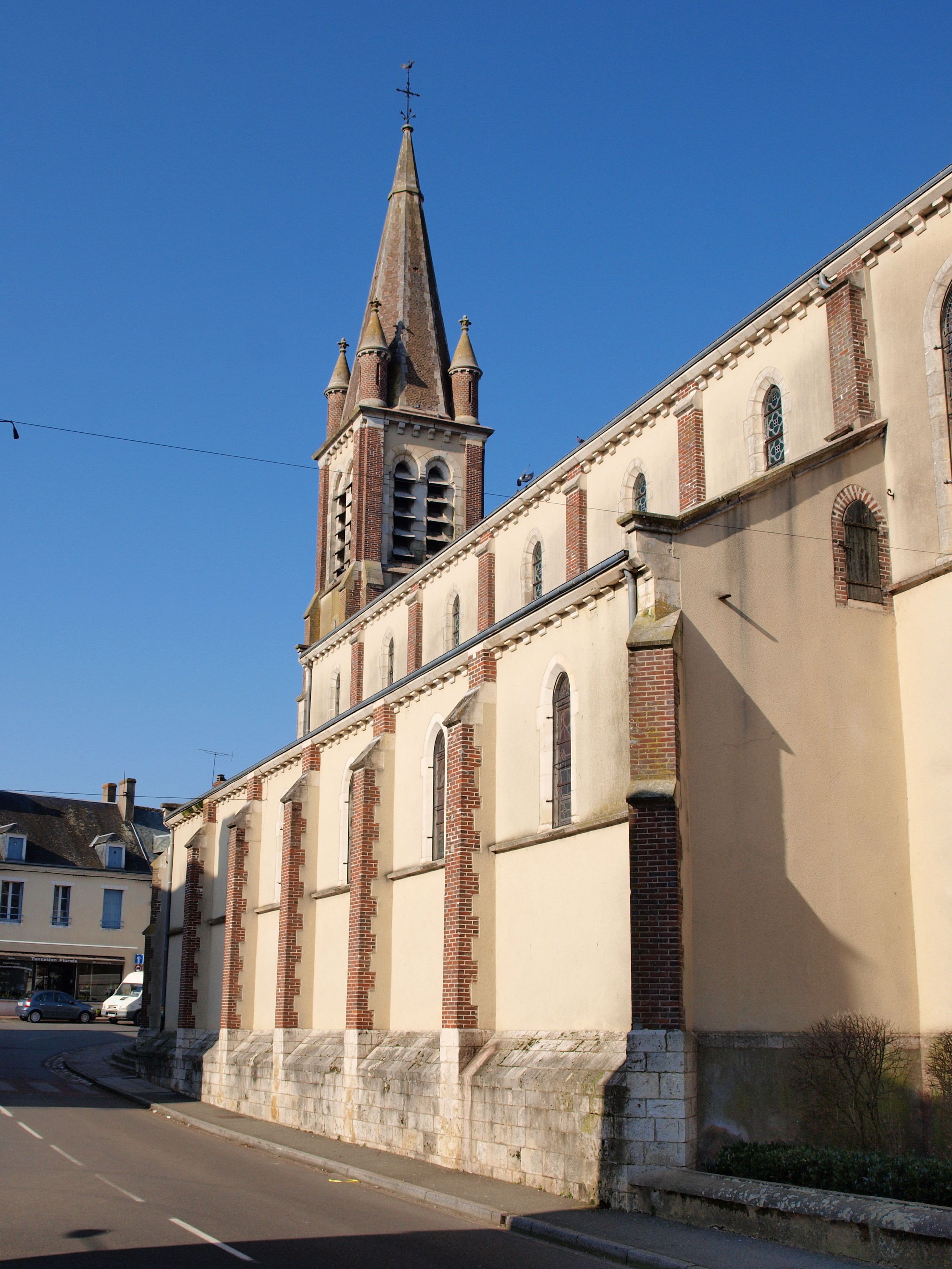 Nogent-sur-Vernisson (Loiret, France)